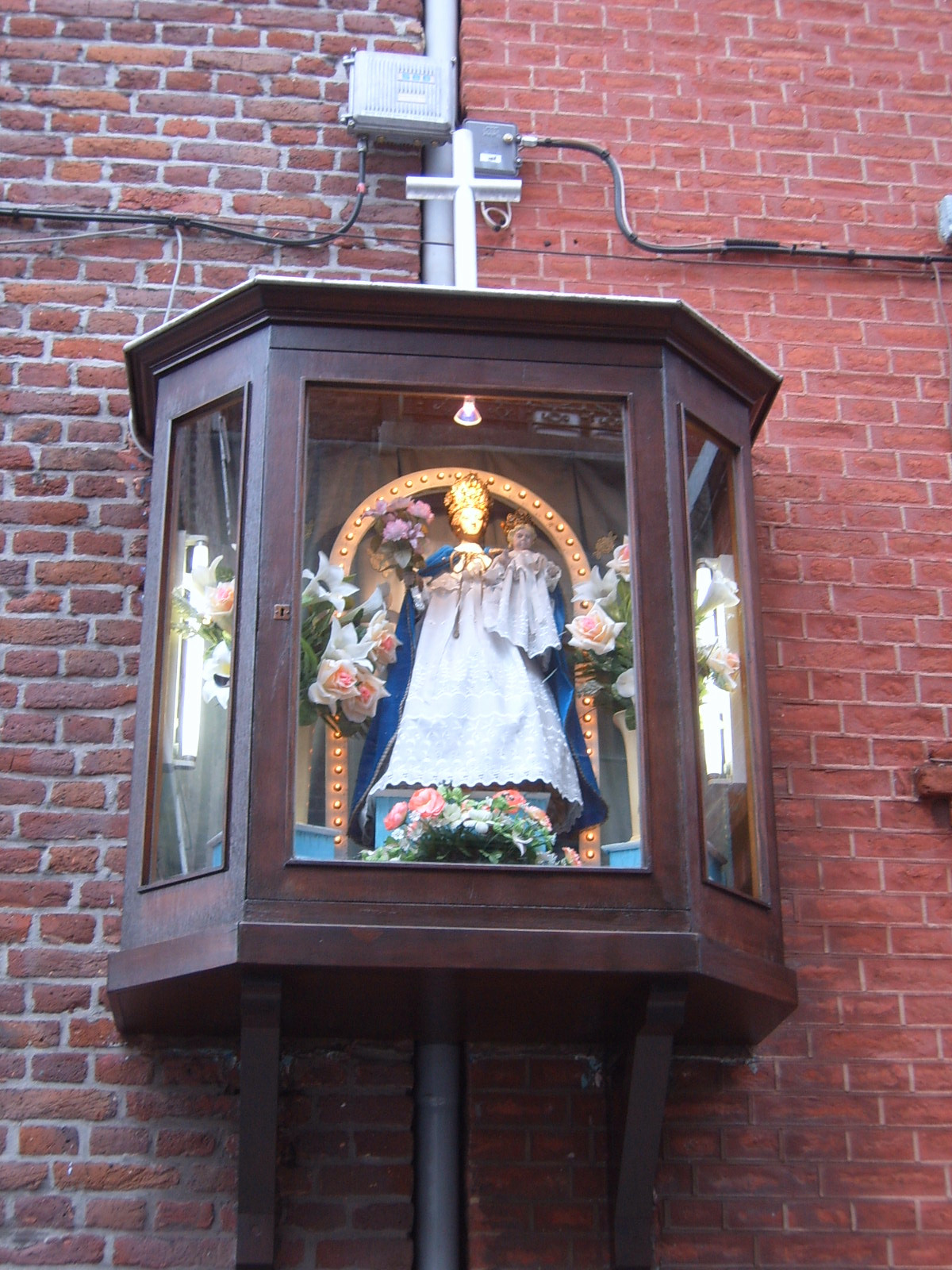 Potale en Outremeuse. Personal picture.